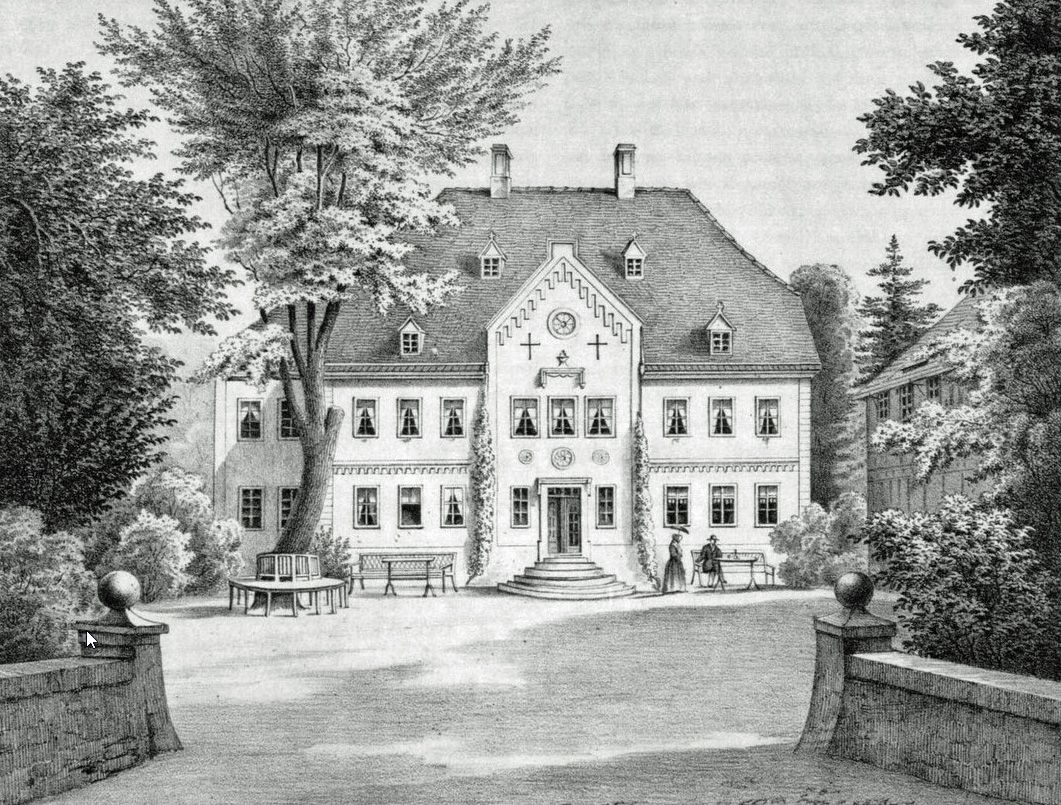 Das Herrenhaus des Gutes Zöpen um 1850